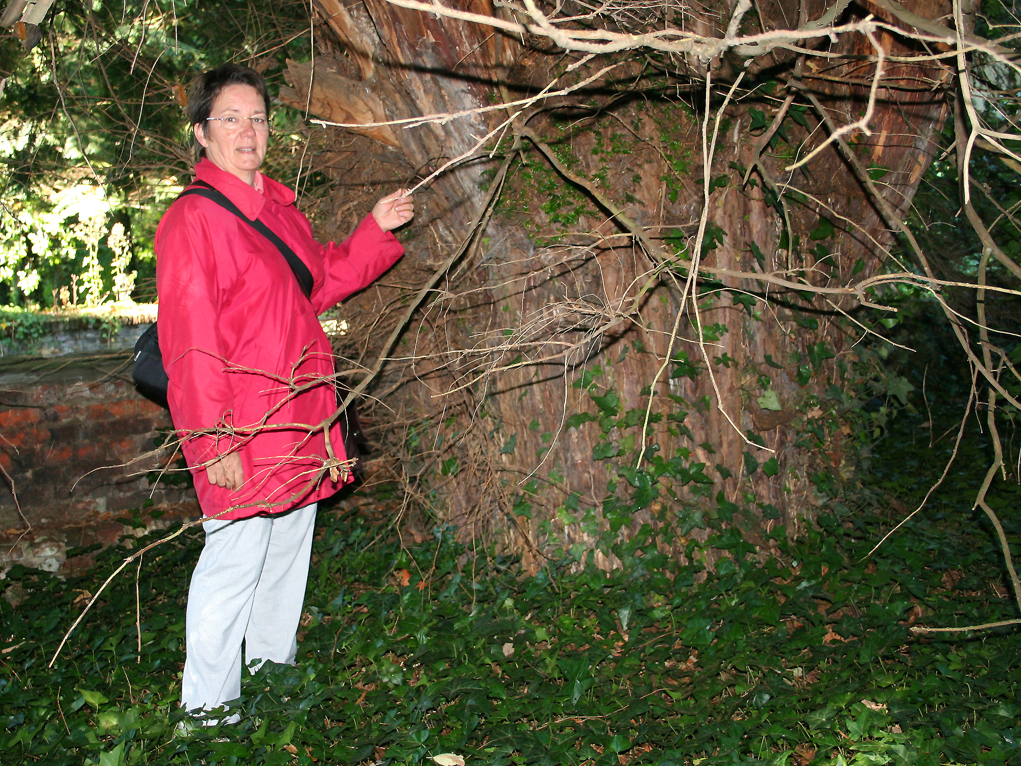 Tronc de l'if commun (Taxus baccata) planté par Martin de Hornes en 1568 en souvenir de l'éxecution à Bruxelles par ordre du duc d'Albe de son parent Philippe de Montmorency comte de Hornes. Circonférence mesurée à 1m50 du sol: 533 cm - (2008) Position exacte : Braine-le-Château (Belgique) – Parc du château Robiano.